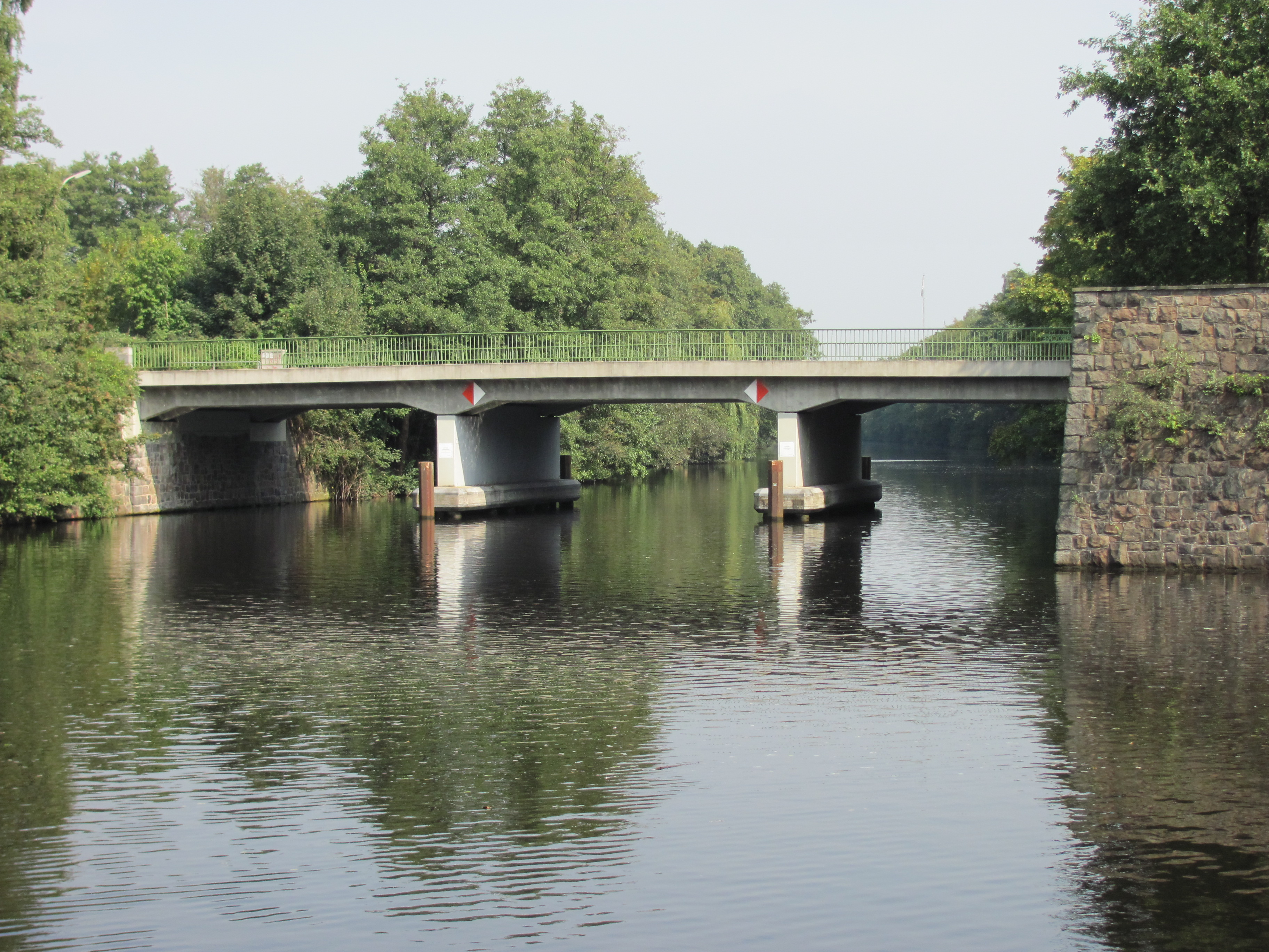 Hindenburgbrücke in Hamburg